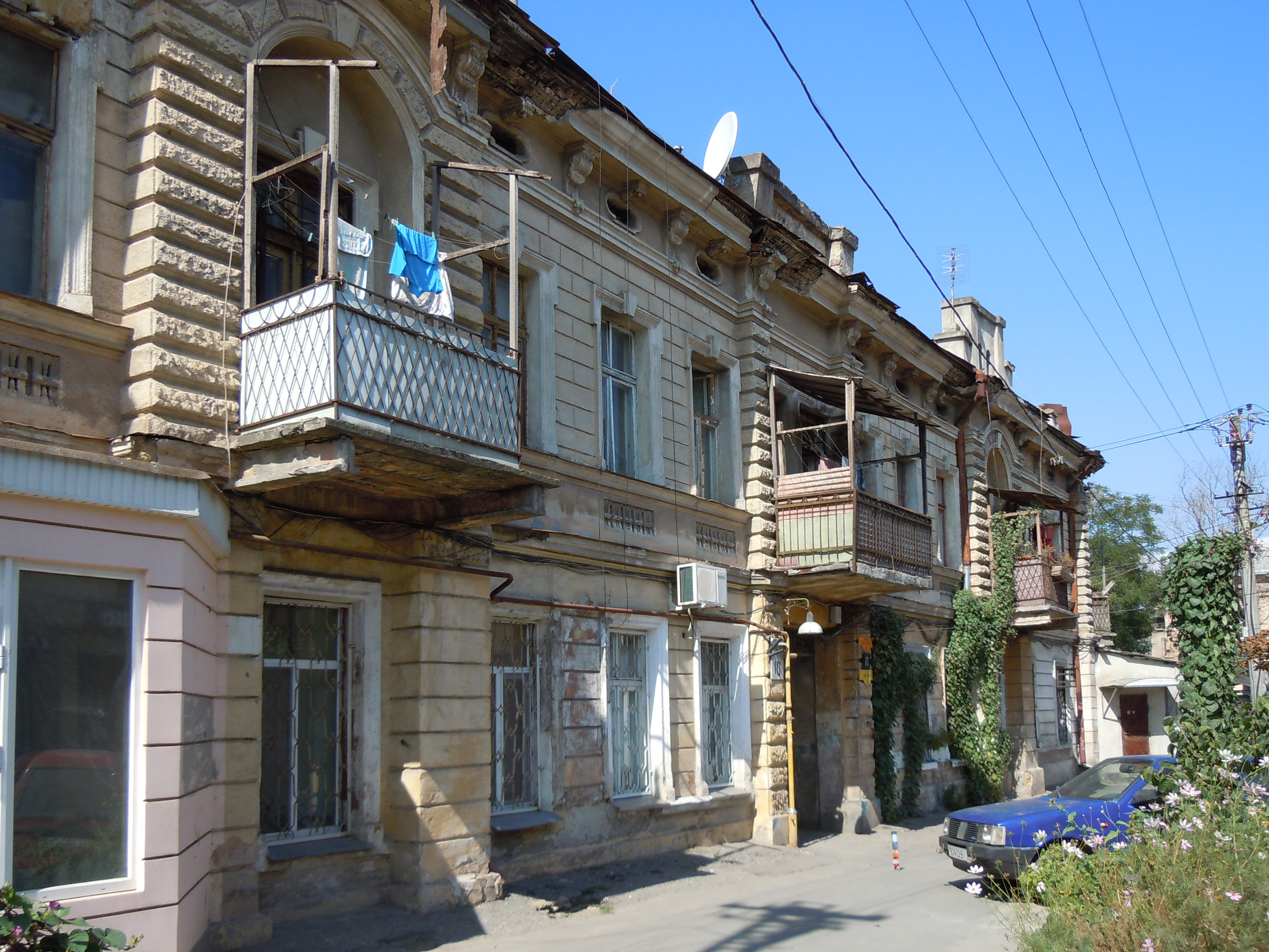 Будинок житловий, Одеса, Скісна вул., 10 ріг Розкидайлівської